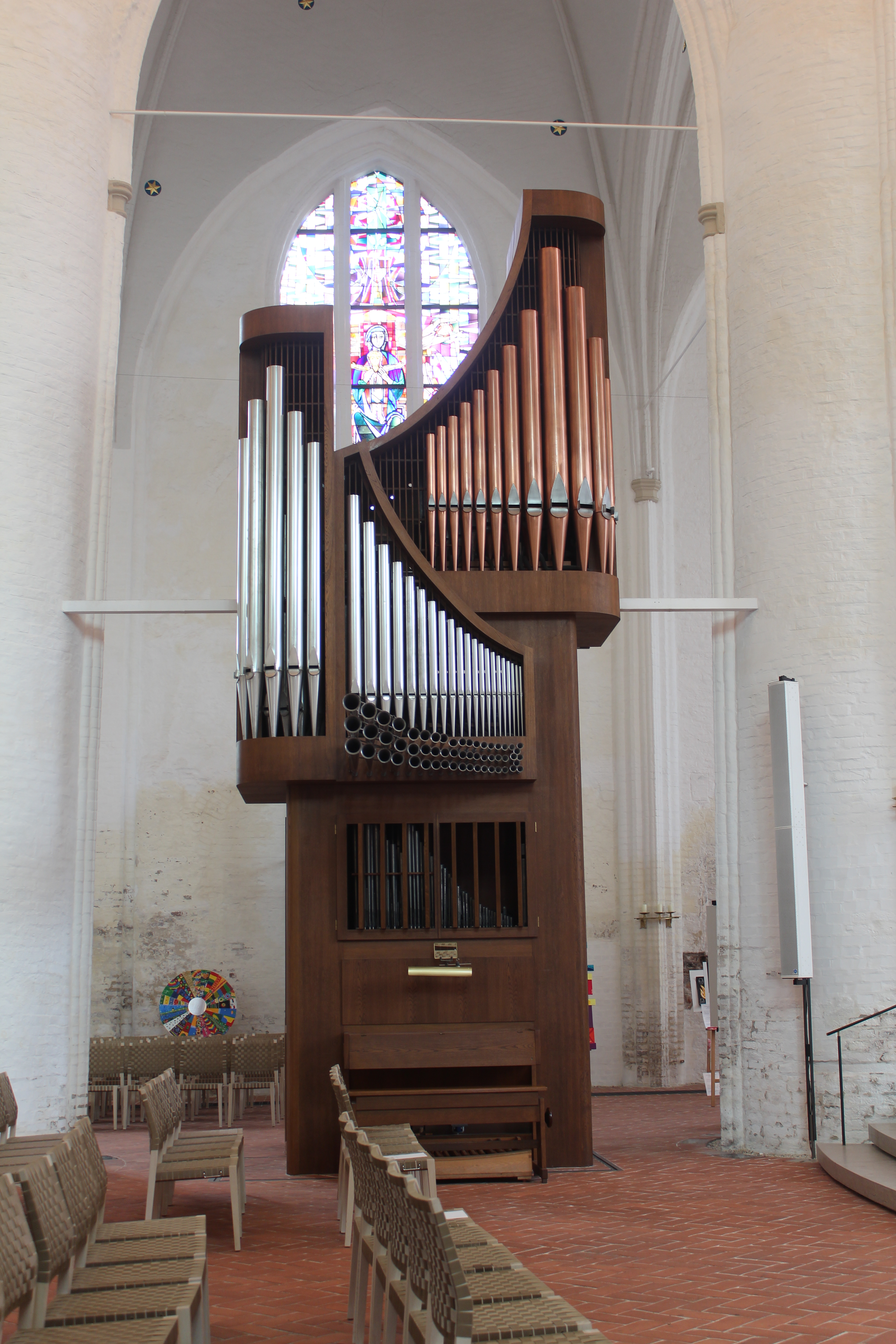 Chororgel von St. Katharinen, Hamburg, Deutschland